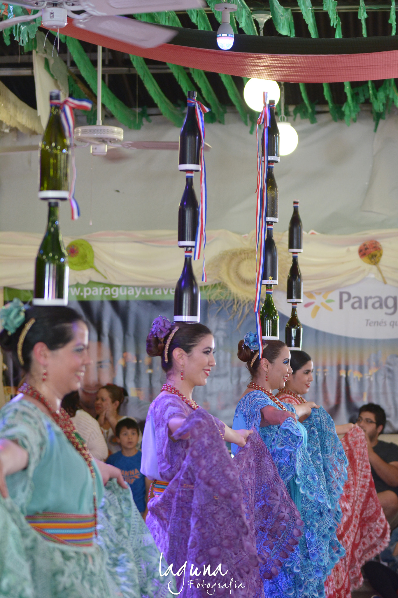 500px provided description: Actuaci?n de el grupo internacional de danza Jeroky Paraguay en la Feria de los Pueblo de Fuengirola, M?laga. [#Colors ,#Spain ,#Woman ,#Happy ,#Happiness ,#Dance ,#Paraguay ,#Dress ,#Malaga ,#Colorful ,#South America ,#Bottles ,#Traditional ,#Fair ,#International ,#Girls ,#Folk ,#Dancing ,#Group ,#Balance]